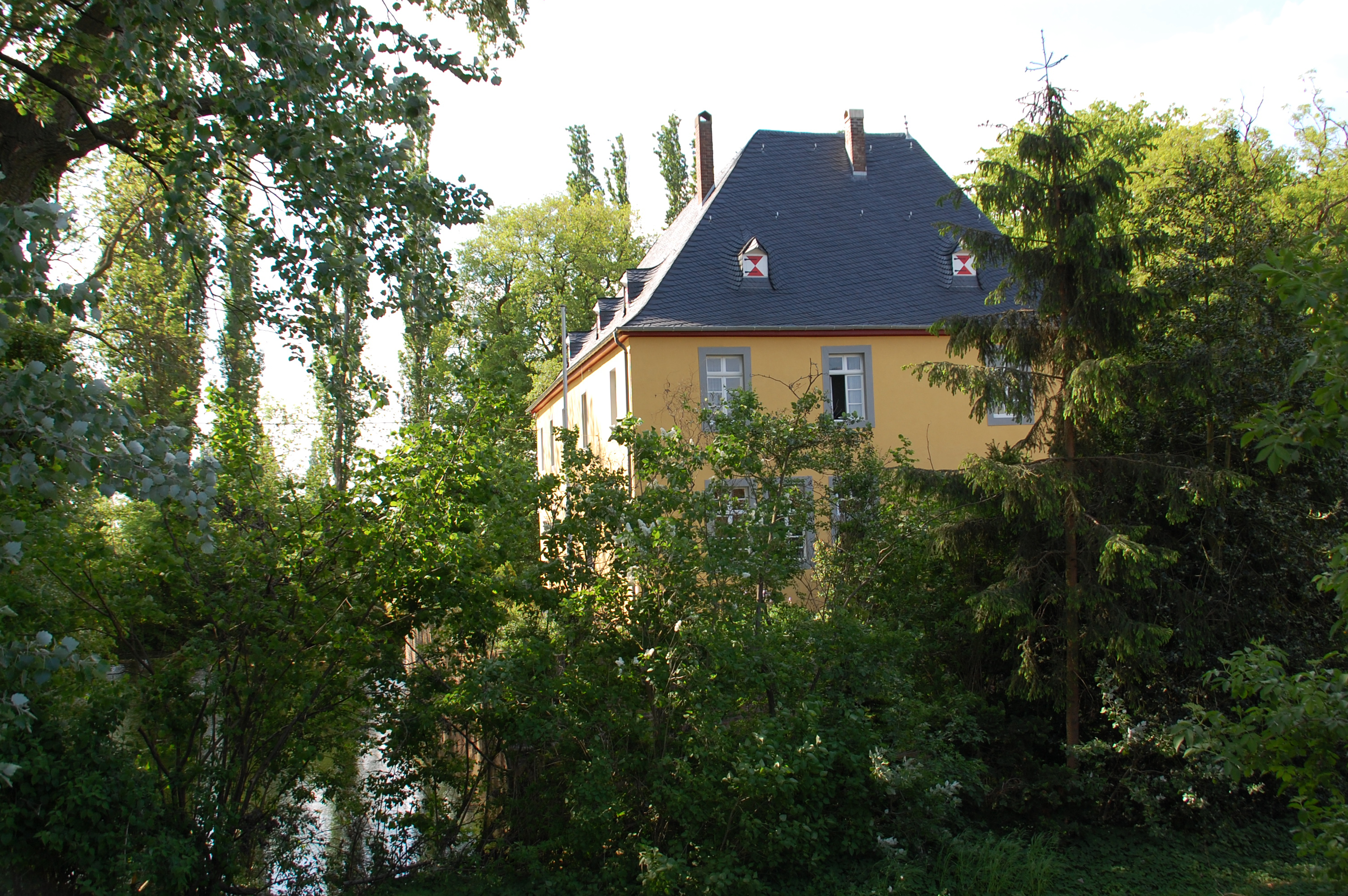 Niederberg, Germany: Burg, Bleistraße 8